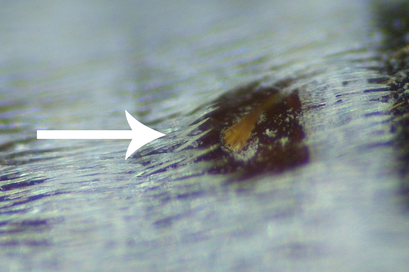 Pheromondrüsen Porus des männlichen Dermestes maculatus (3 Tage alt)